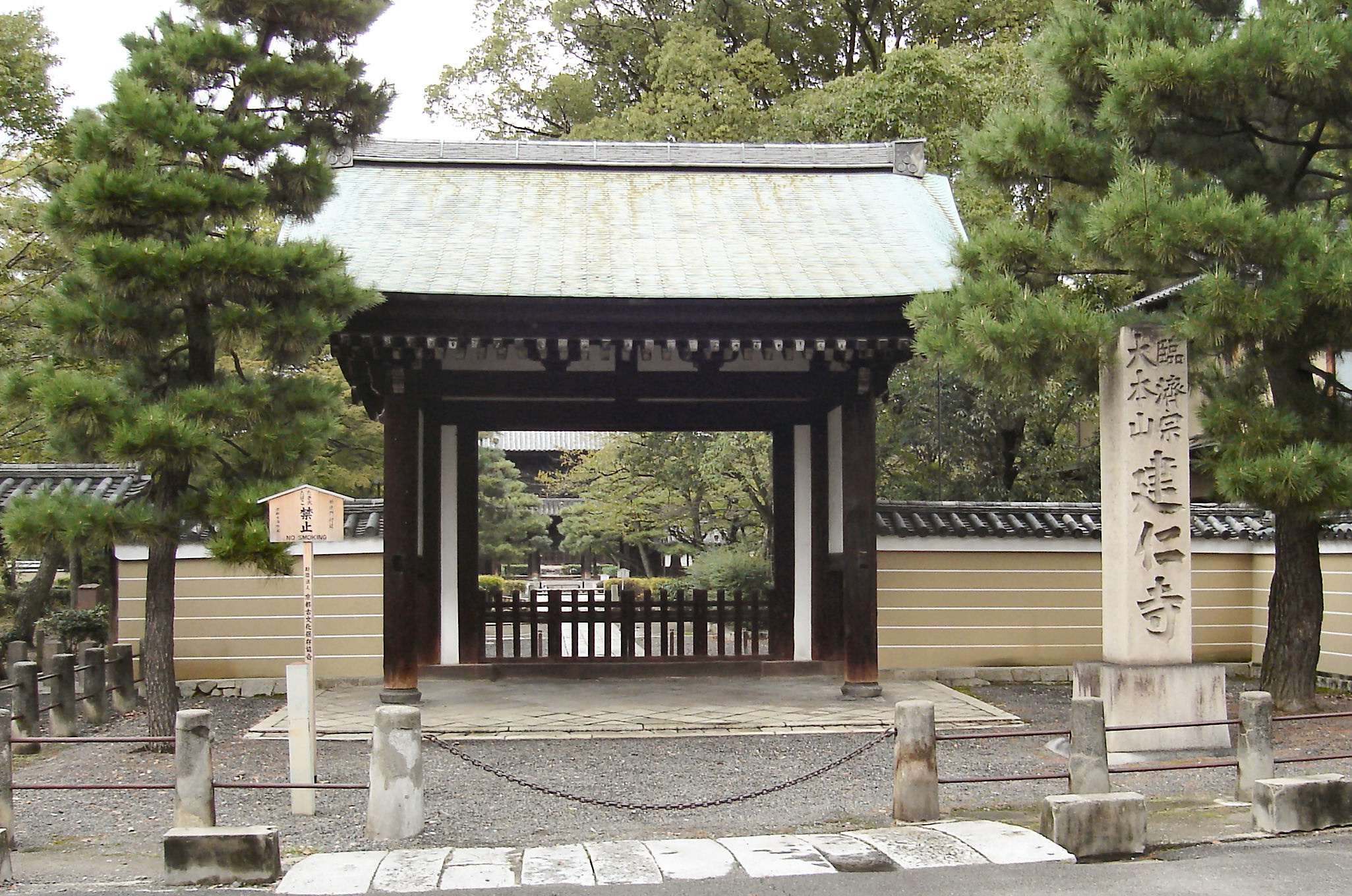 Kenninji Chokushi mon